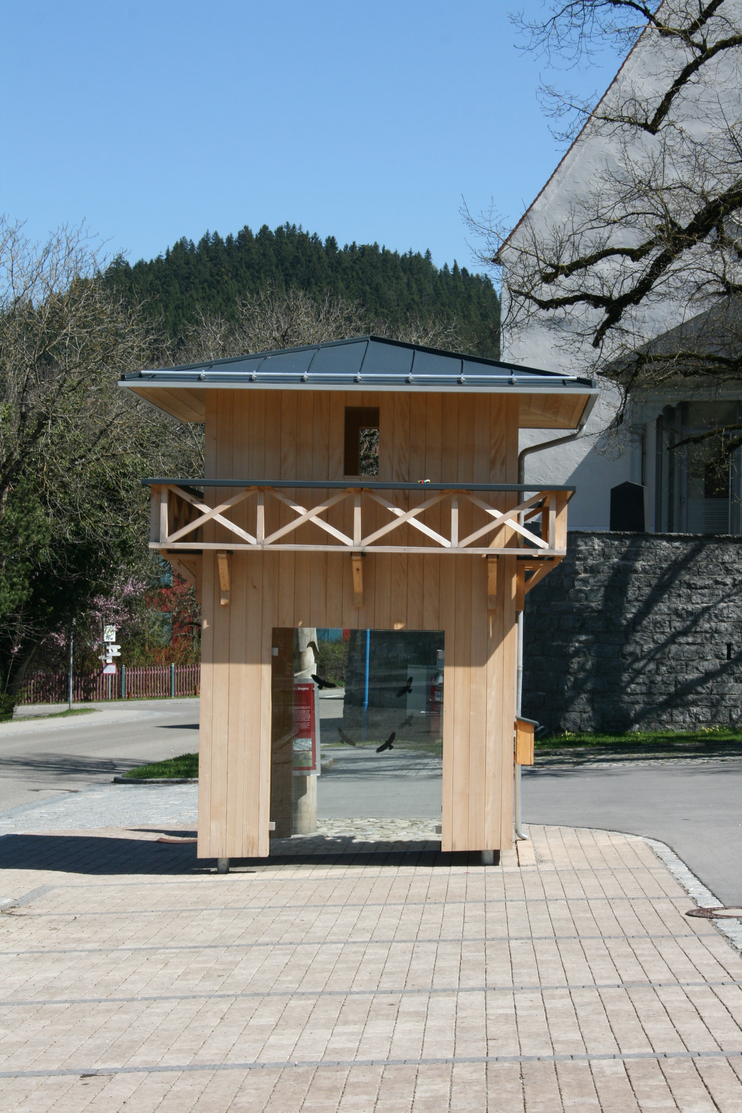 Römerturm